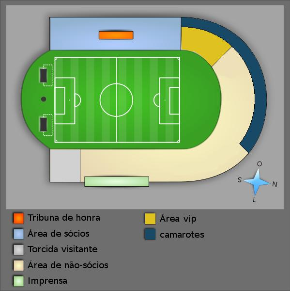 Setores do Estádio de São Januário